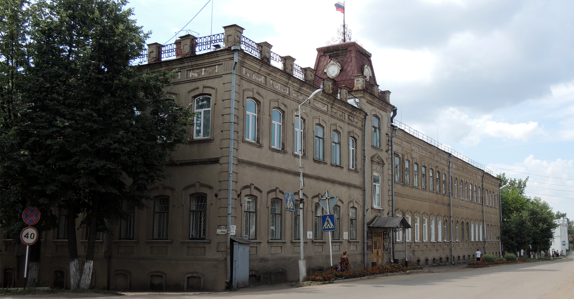 Здание, в котором проходил первый уездный с'езд советов рабочих, крестьянских и солдатских депутатов, провозгласивший Советскую власть в Яранском уезде, ранее Дом купцов Носовых, сейчас Администрация города: улица Кирова, 10, Яранск, Яранский район, Кировская область